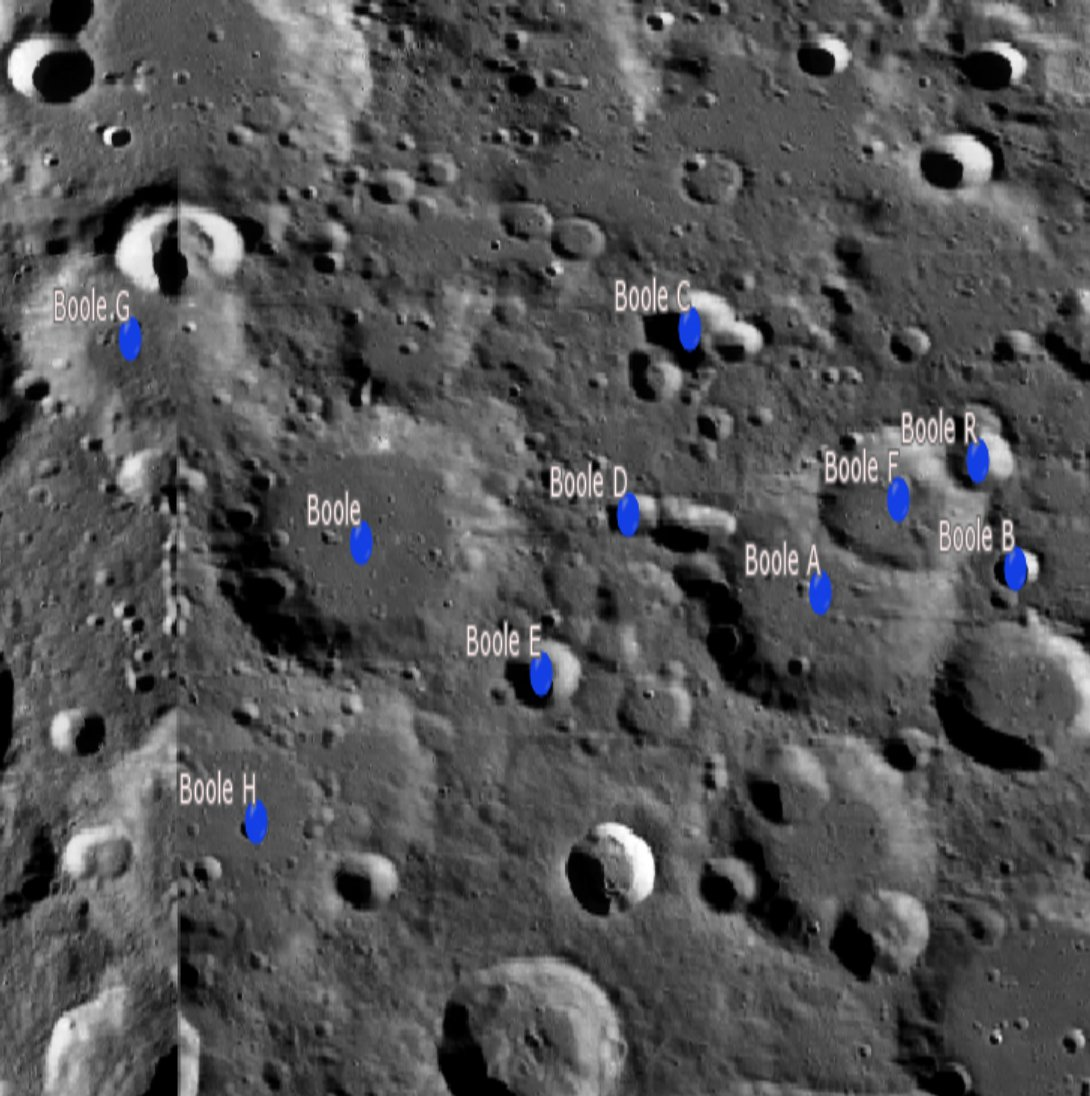 Cráter lunar Boole. Cráteres satélite. (Imagen LRO)